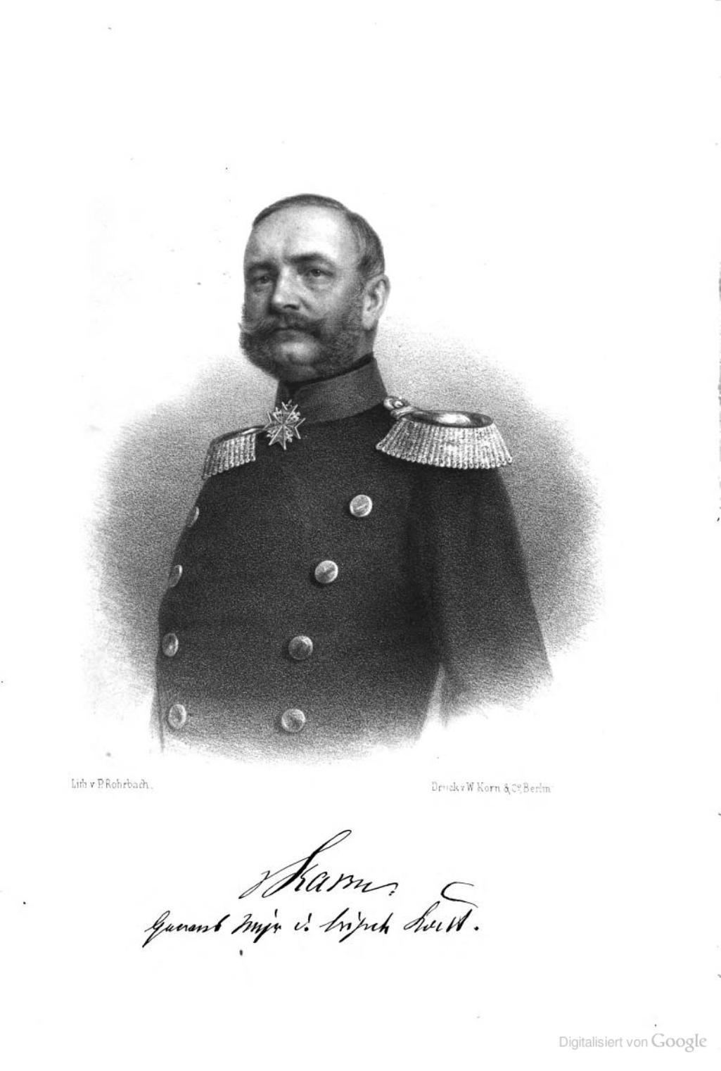 Eduard von Raven (1807-1864) , koeniglich preussischer General-Major